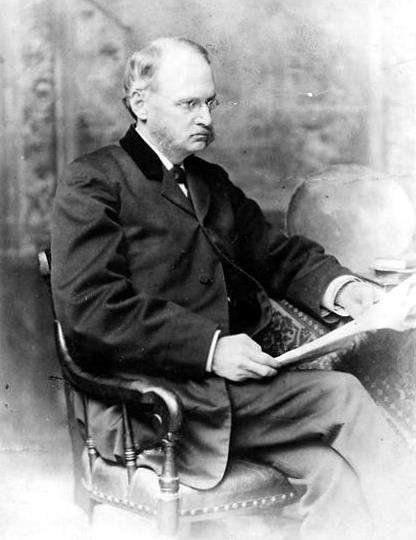 David A. Wells, 1886.